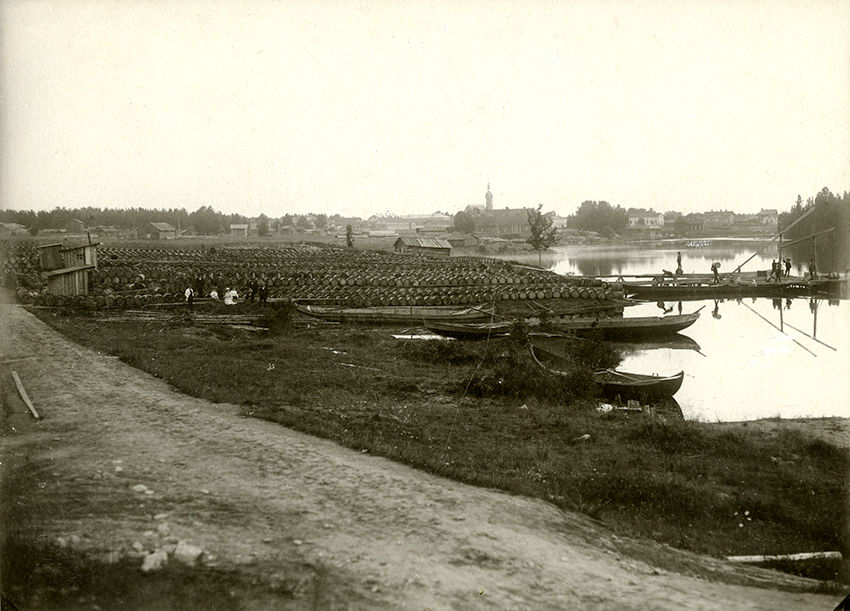 Kajaanin tervahovi 1900-luvun alussa.